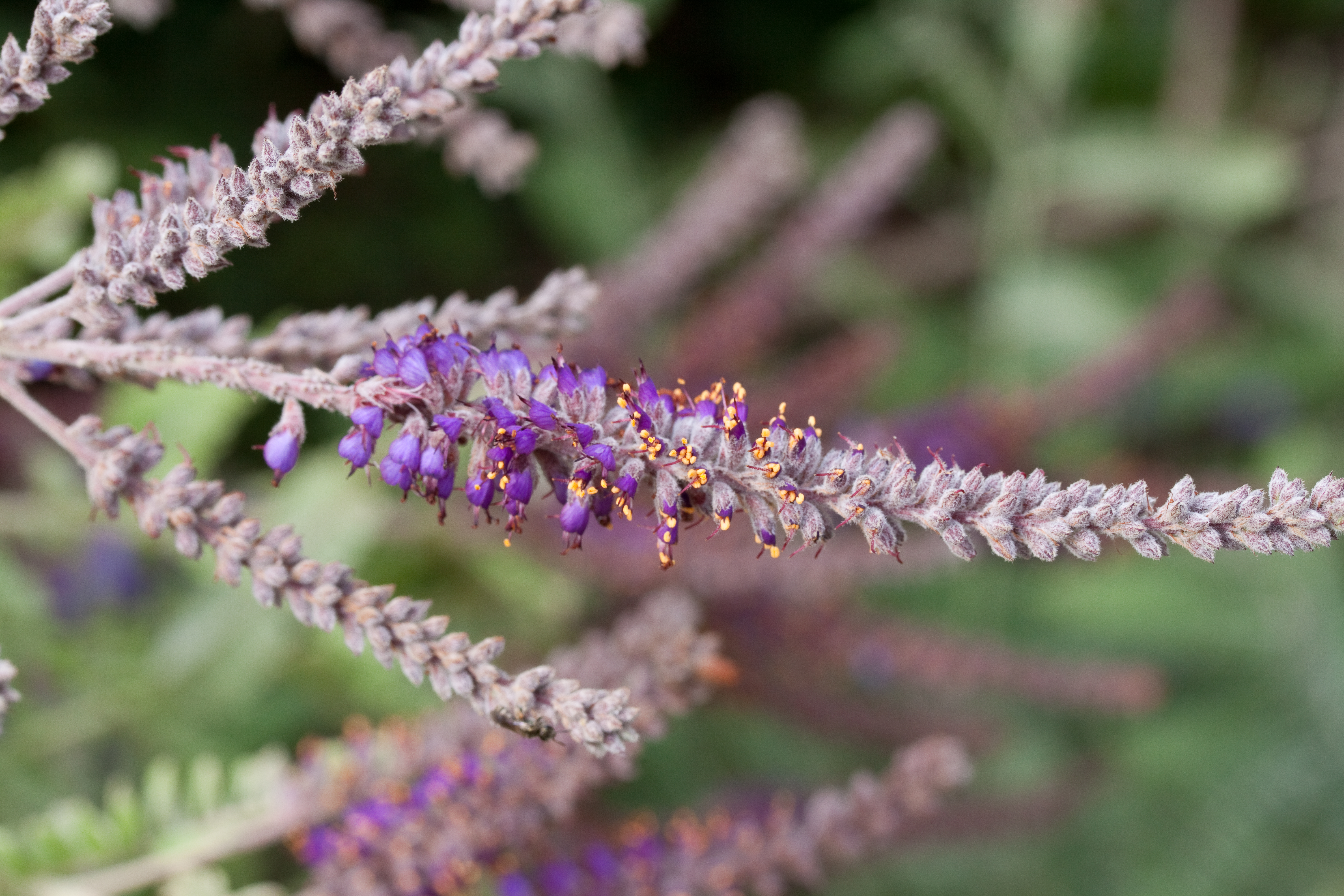 Amorpha nana - Faux indigotier nain - au Jardin Alpin du Jardin des Plantes - Paris